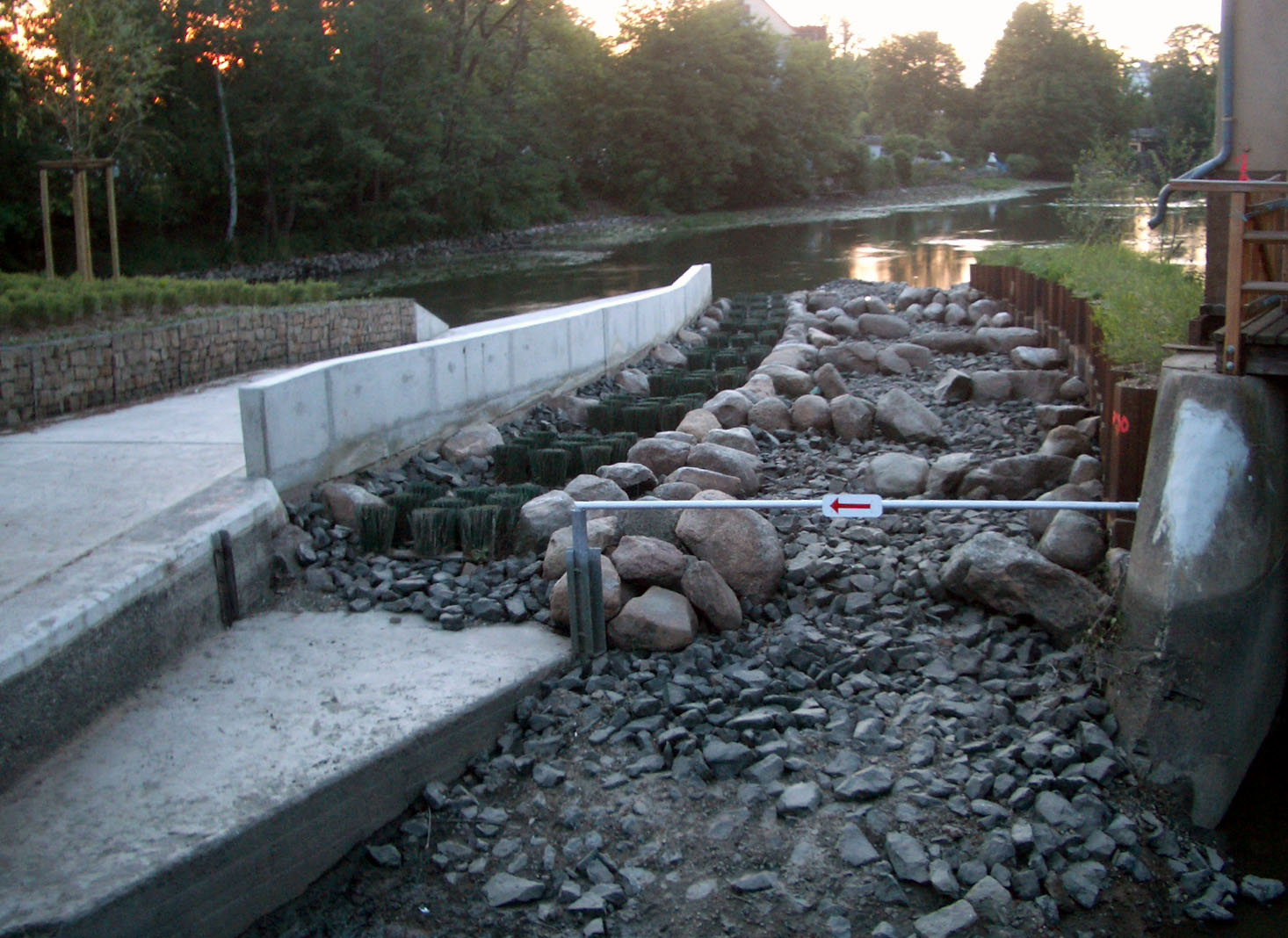 Kombinierte Kanu-Gasse (links) und Fischaufstiegshilfe (rechts) am Eisenbüttler Wehr im Verlauf der Oker in Braunschweig. Das Bild wurde aufgenommen als der Wasserstand der Oker wegen Bauarbeiten extrem abgesenkt war. Baujahr der Anlage: Winter 2005/2006.